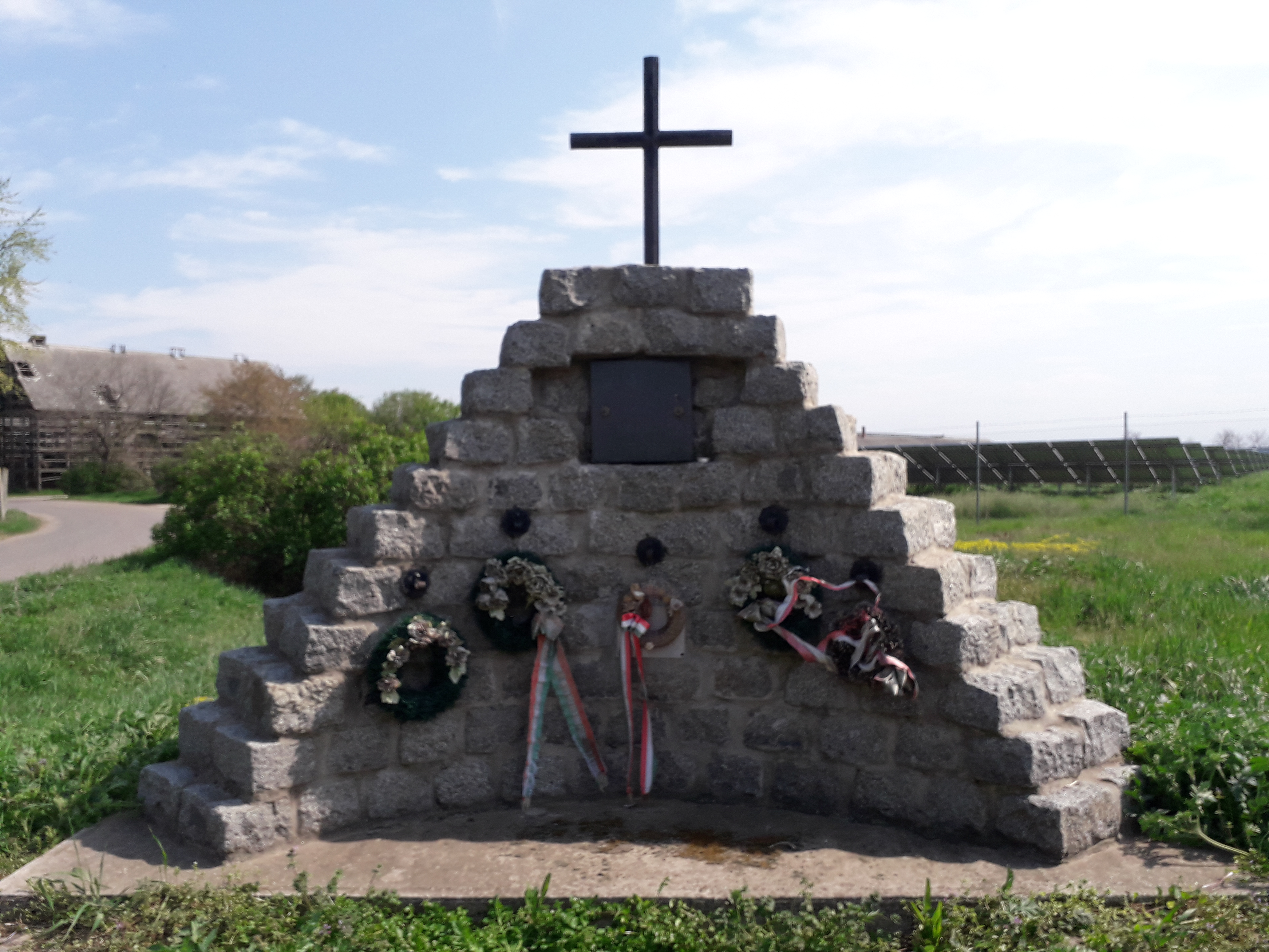 Székács-féle iskola emlékműve